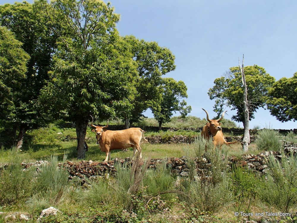 Dizzying heights in Portugal